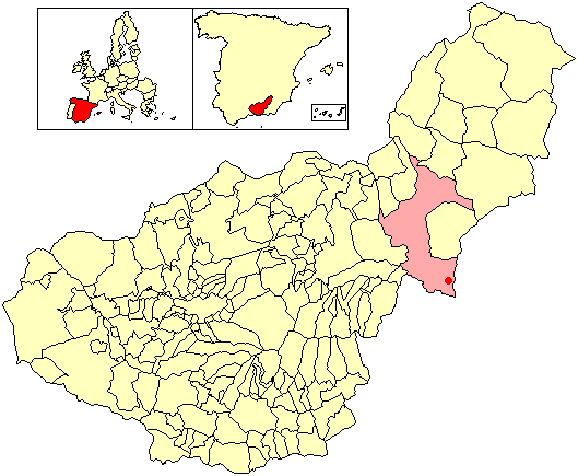 Situación de la localidad de Benacebada (en el municipio de Baza) respecto a la provincia de Granada, en España.